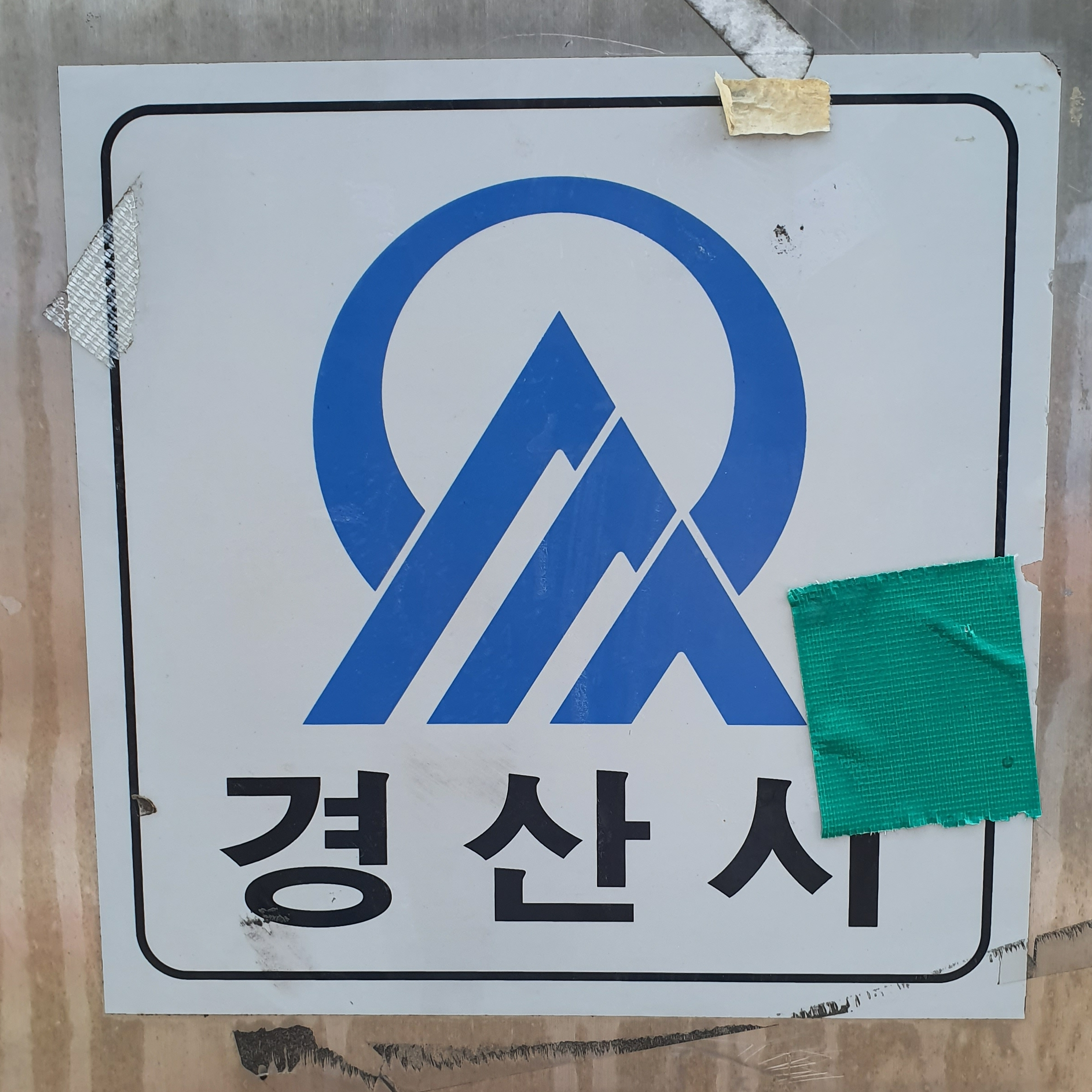 경산시의 구 로고